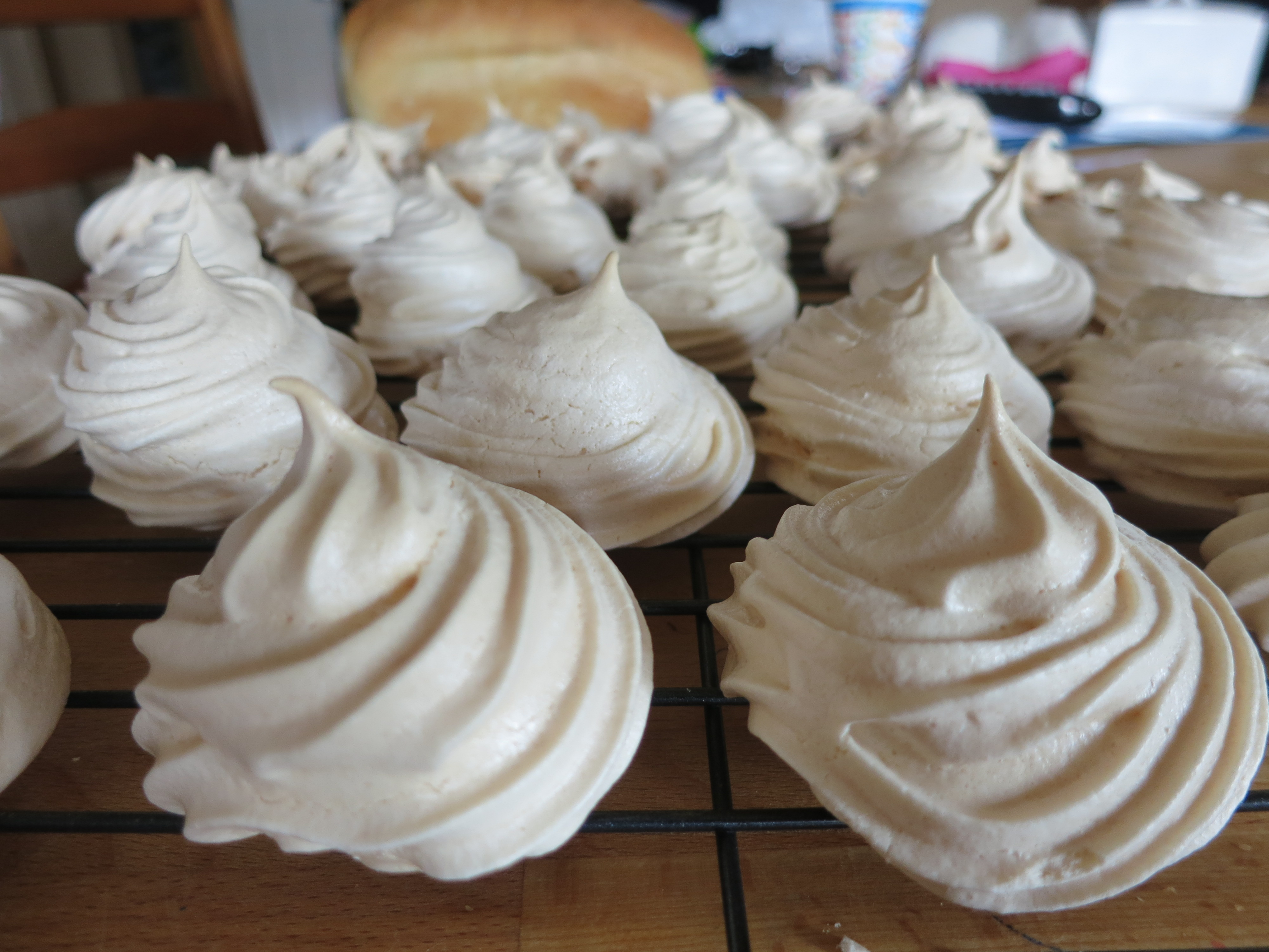 Homemade meringues